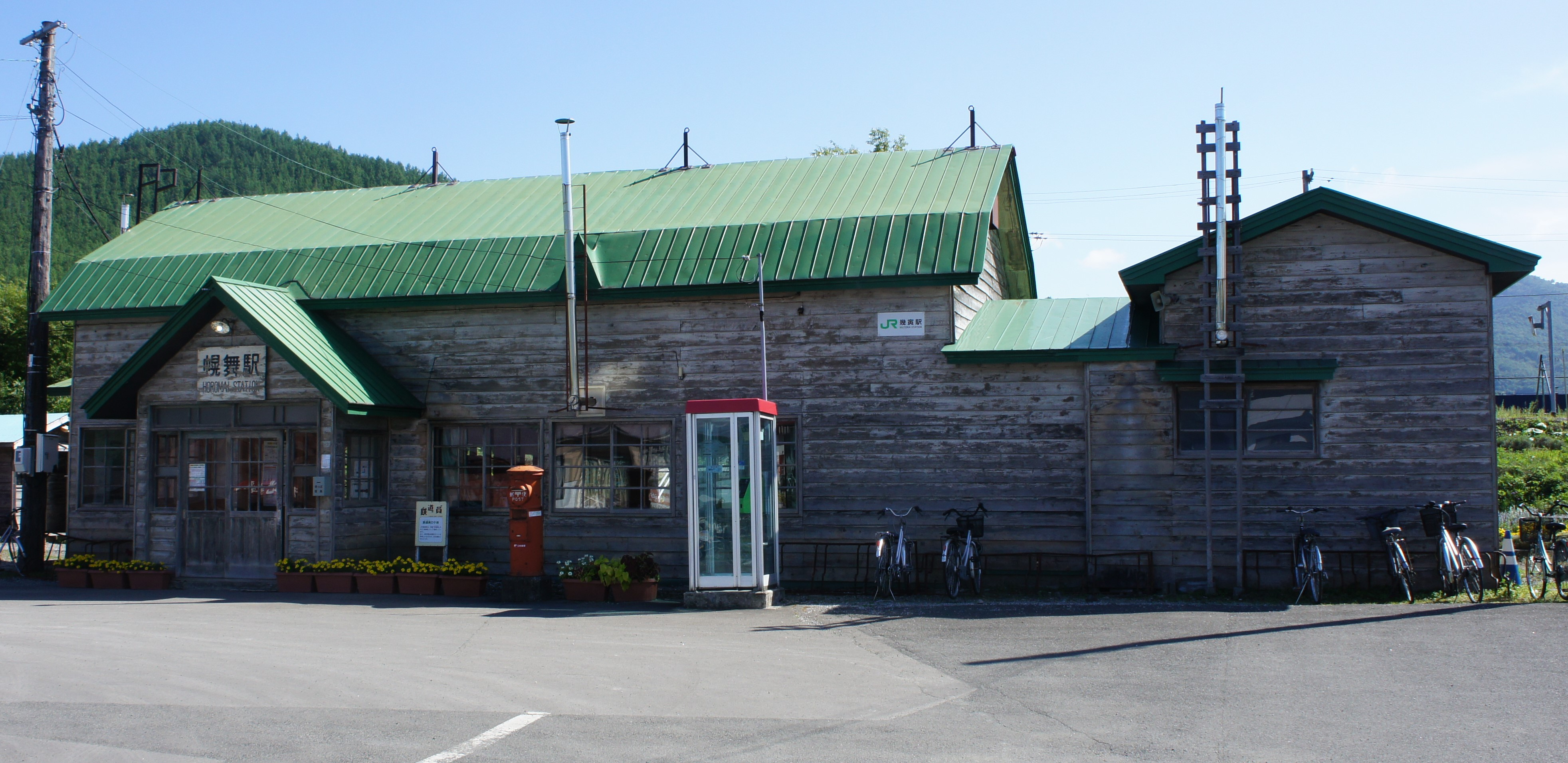 JR根室本線・幾寅駅の駅舎